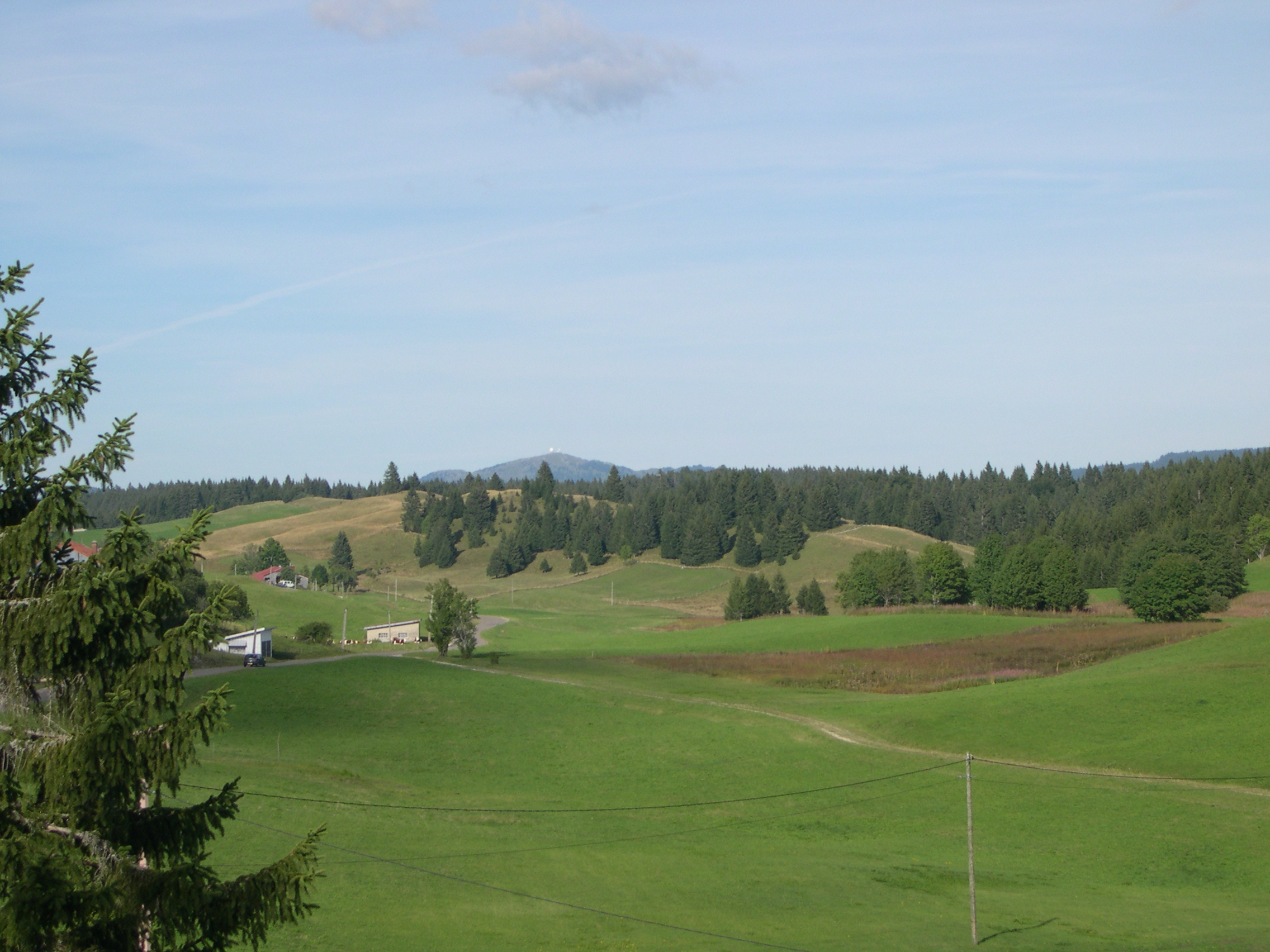 Vue sur le Parc Naturel Régional du Haut-Jura depuis, 39310 Les Molumes, lieu-dit la Simard, 1250 m. Au fond le massif de La Dôle